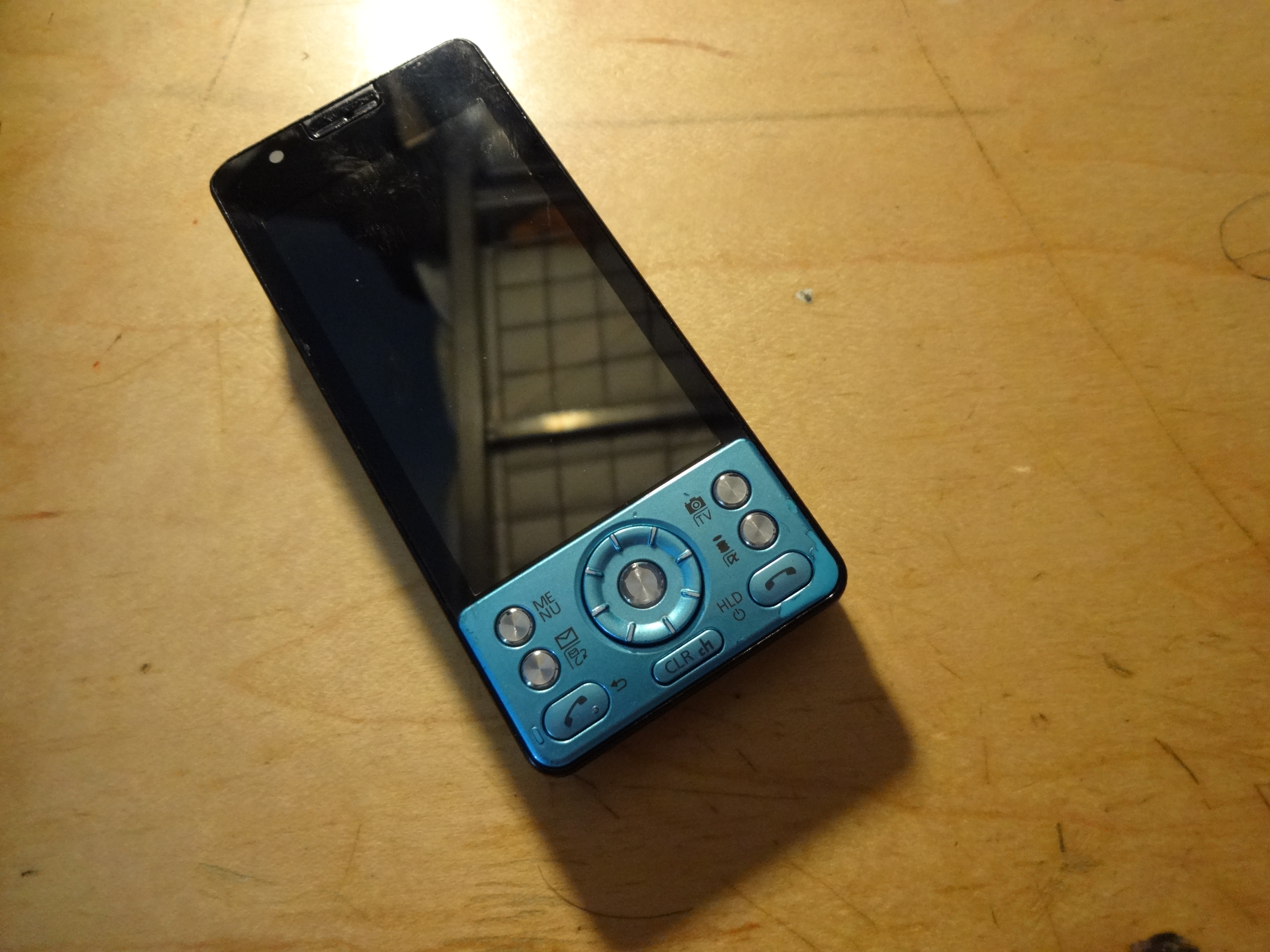 P-03C(ブルー)